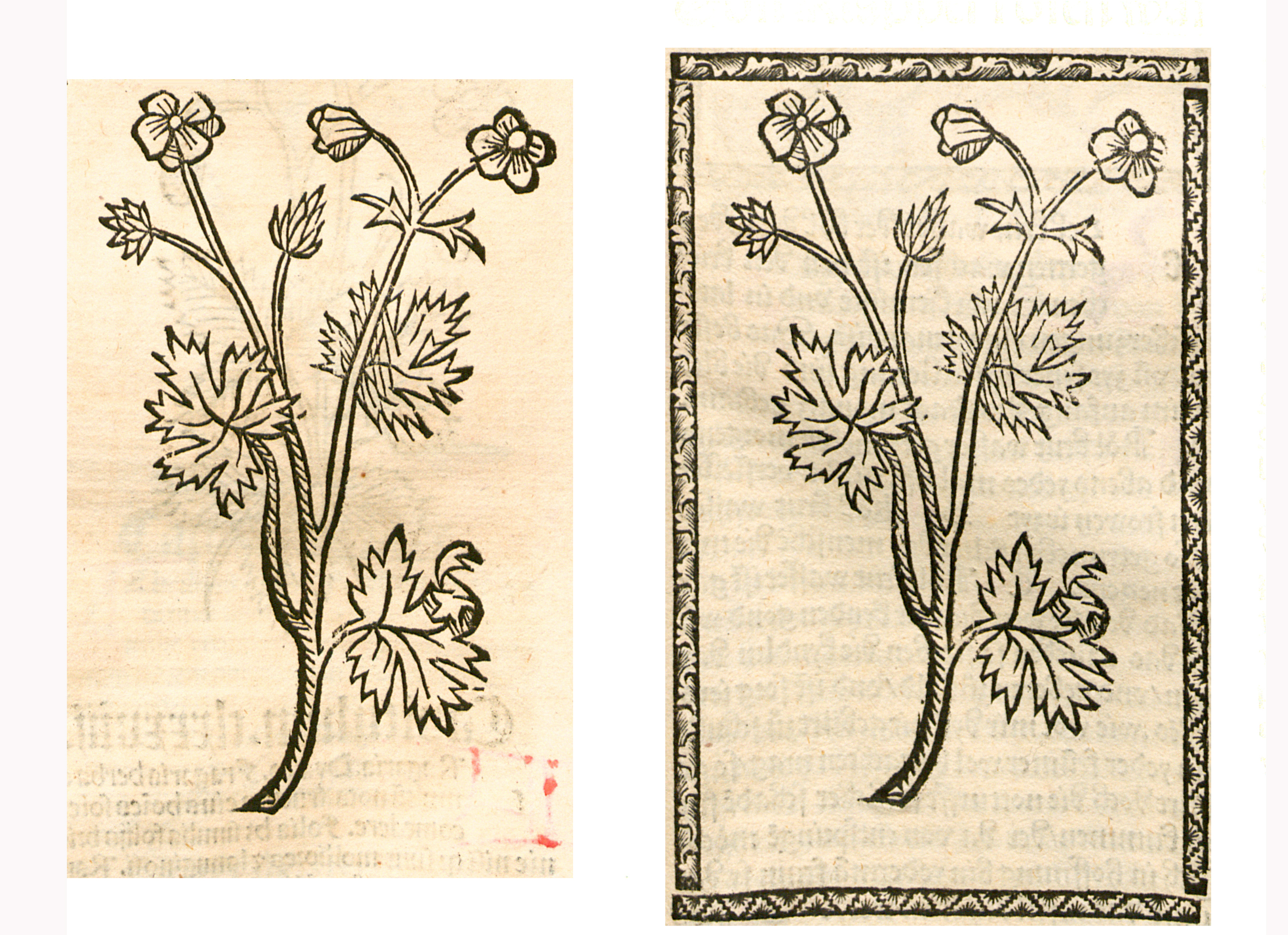 Abbildung von: Klapper Rosen (Papaver rhoeas)